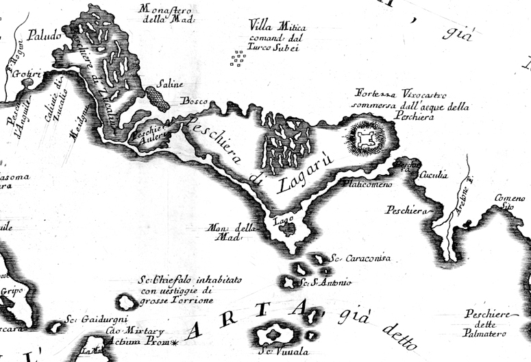 Κάστρο Ρώγων, Παναγιά της Ροδιάς, Μύτικας, Κομμένο, Κορωνησία, Λογαρού, Τσουκαλιό, Αρχαίος Άμβρακος(Φιδόκαστρο), 1691